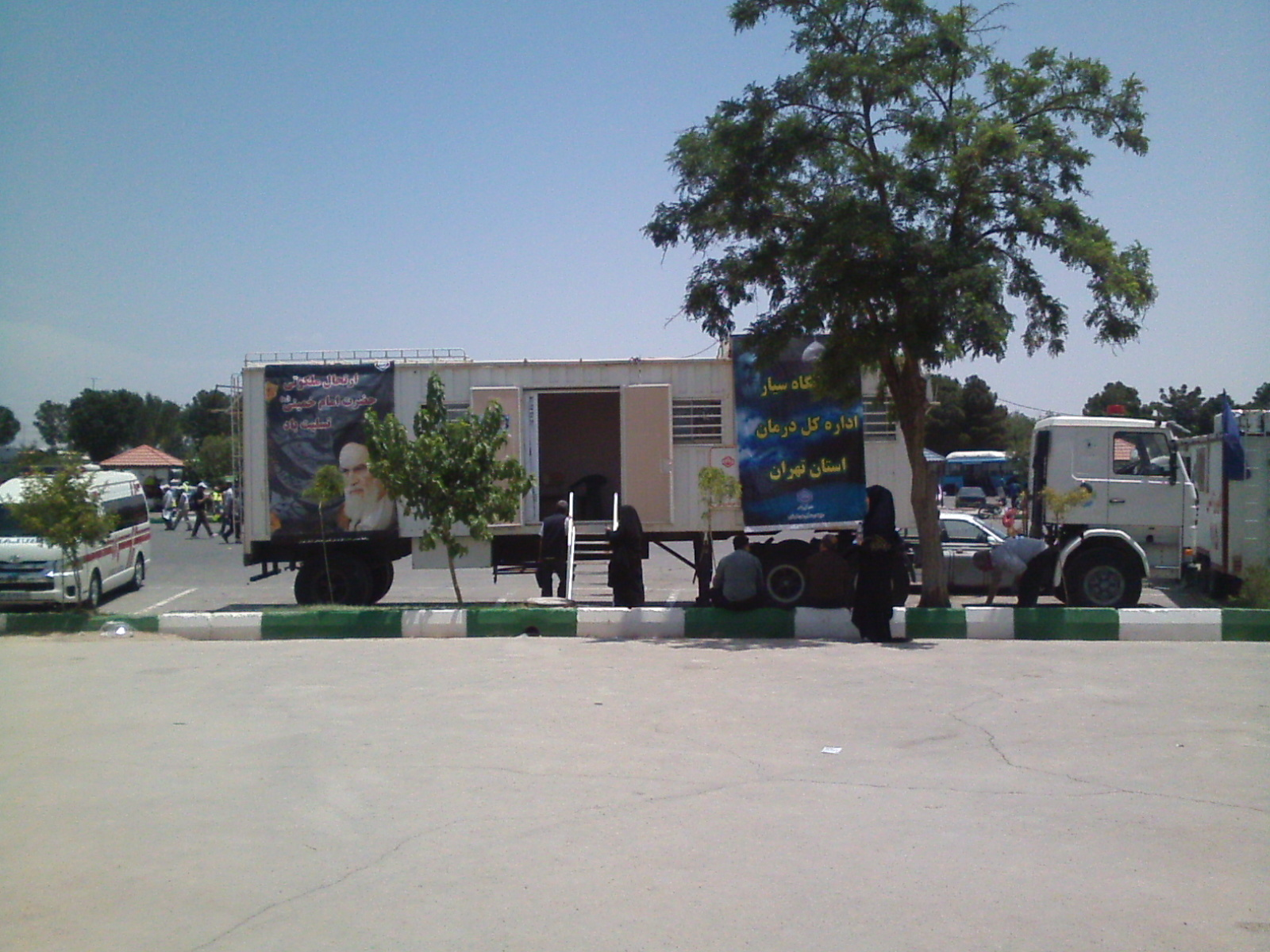 درمانگاه سیار در آرامگاه سید روح‌الله خمینی